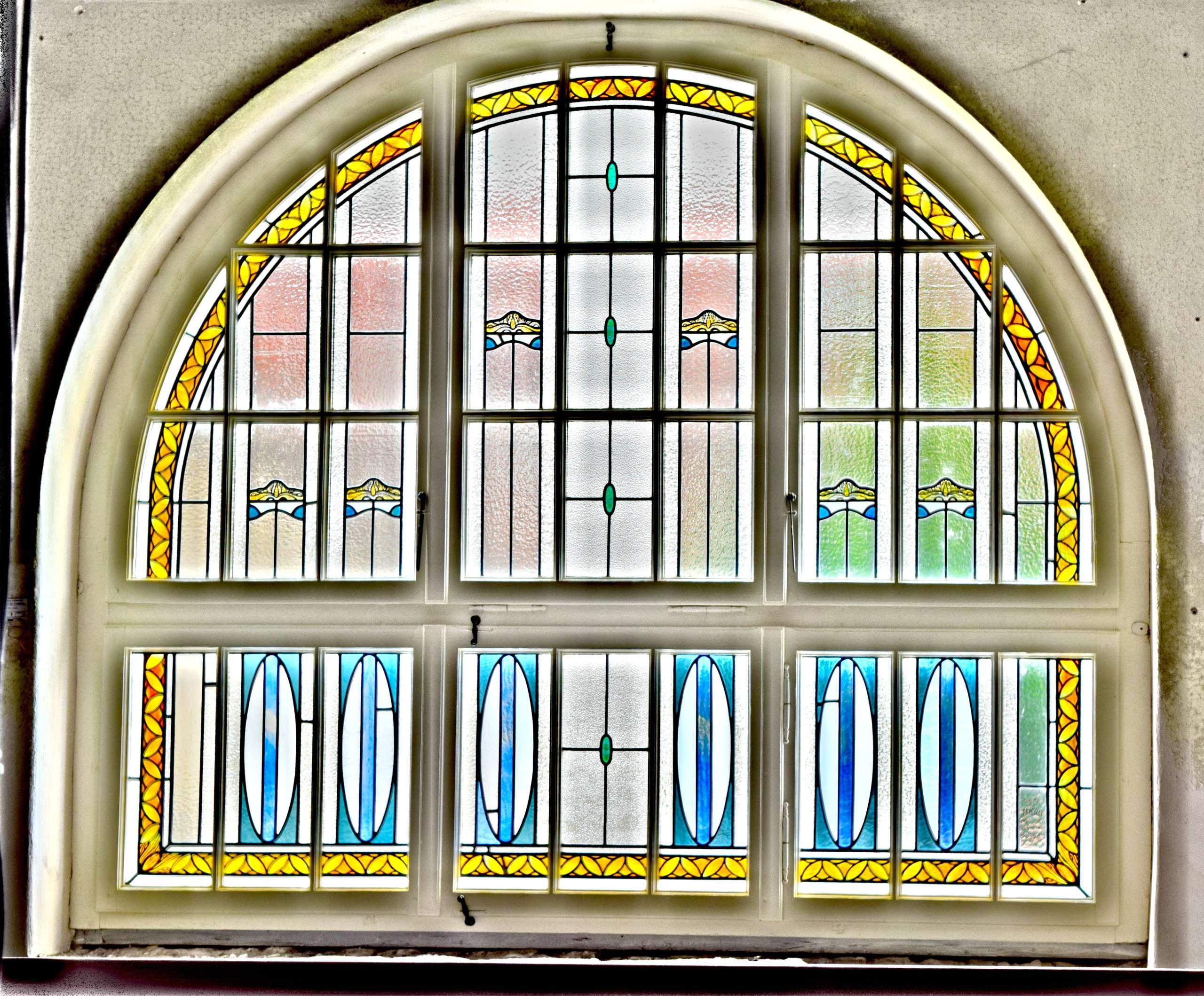 Im Obergeschoss des Foyer wurde ein renoviertes Fenster im Jugendstil eingebaut.